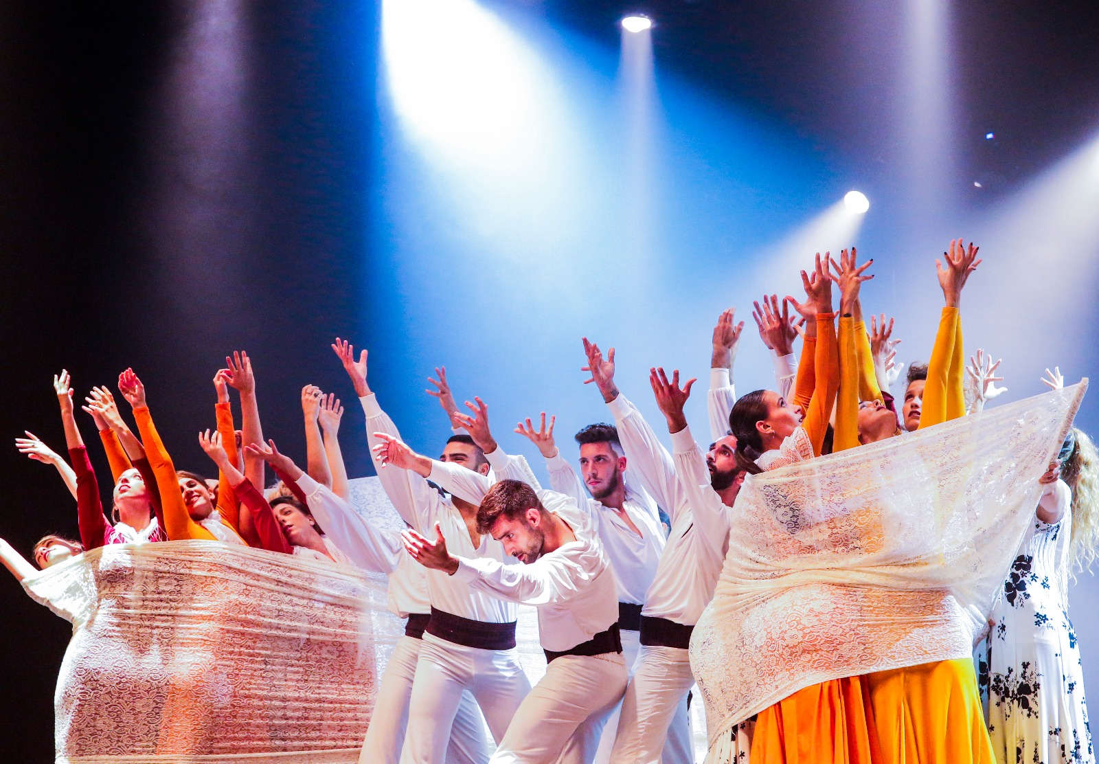 תמונת מחול